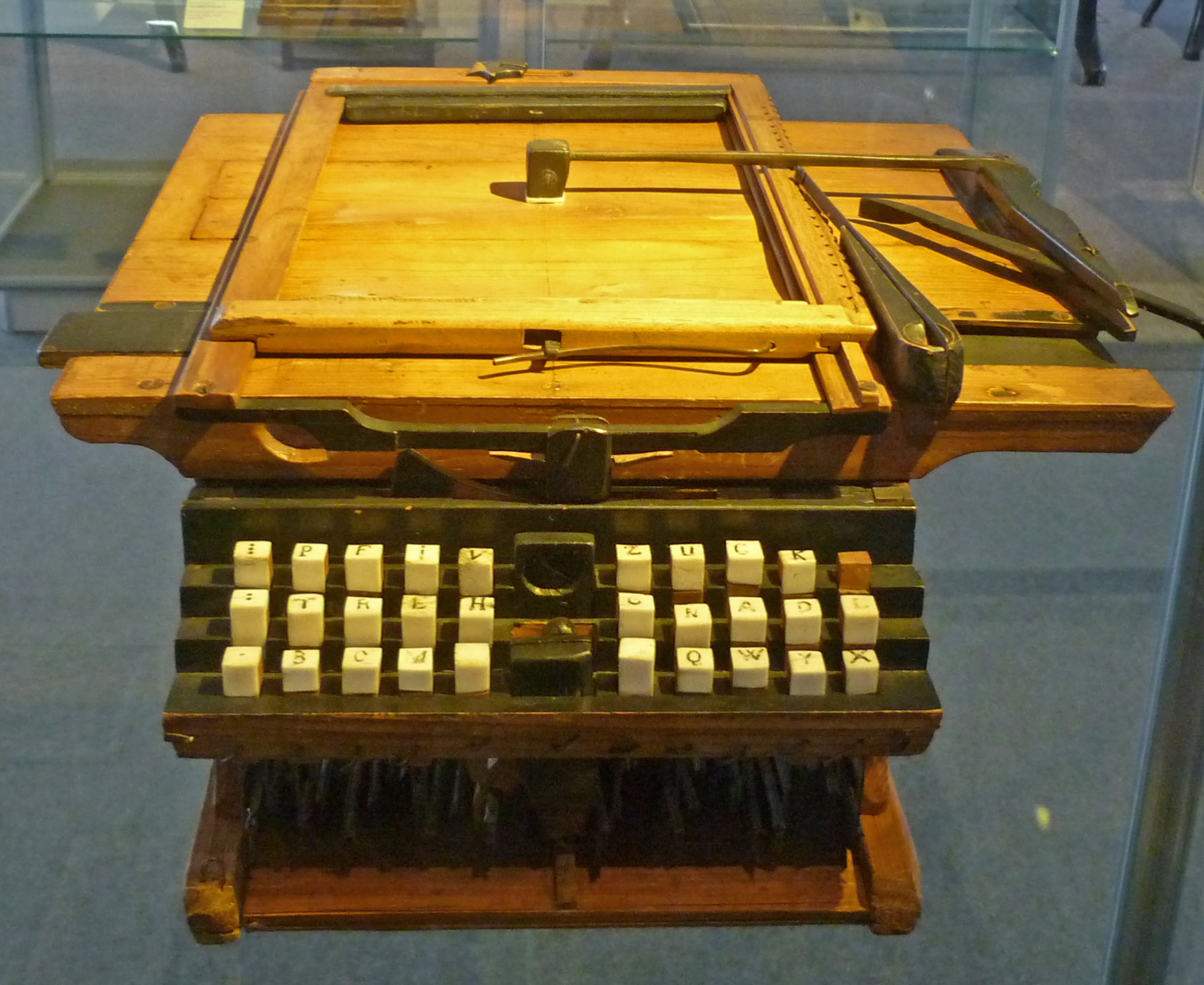 Technische Sammlungen Dresden: Hölzerne Schreibmaschine von Peter Mitterhofer (1822-1893) aus Partschins in Tirol